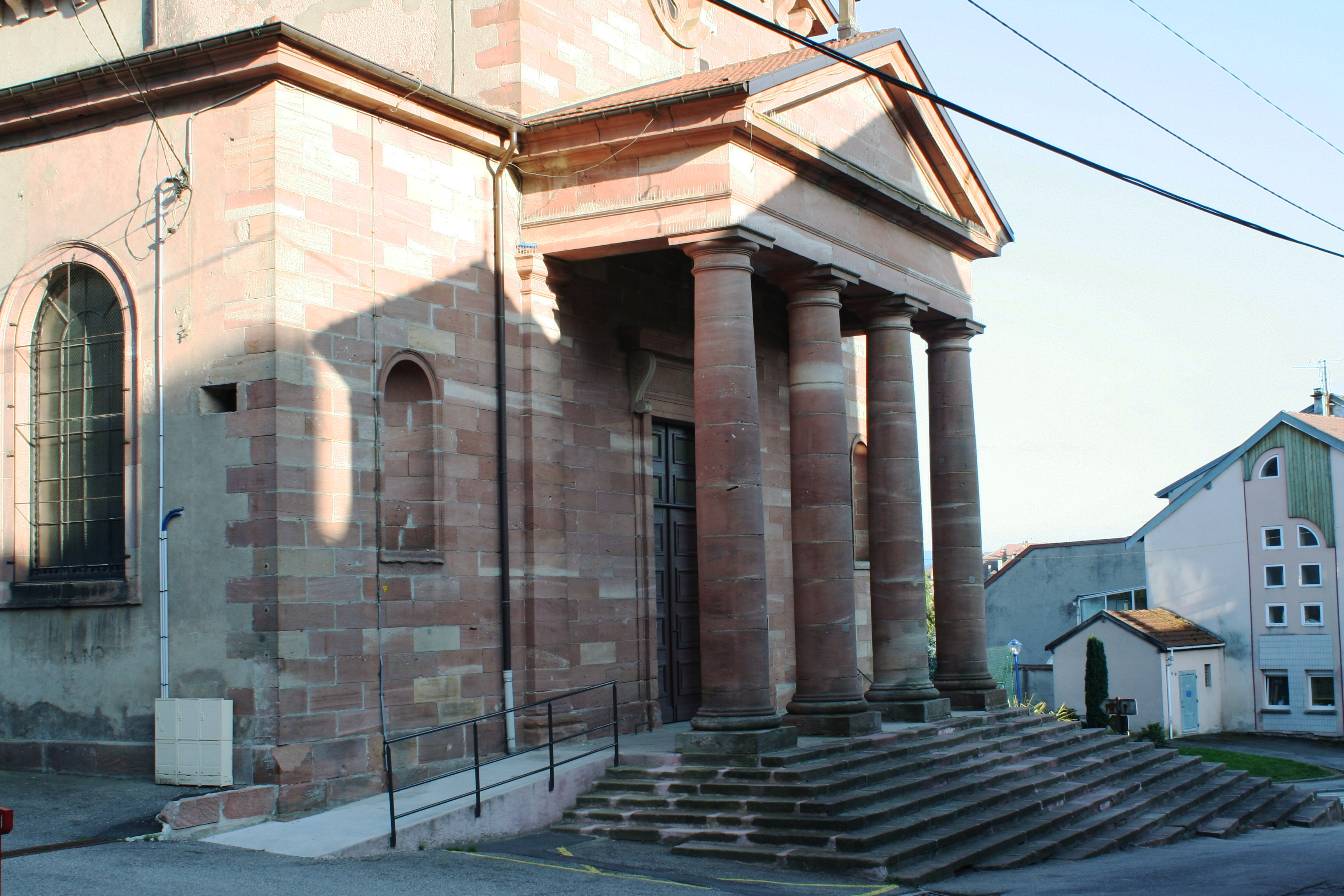 Église Notre-Dame-de-l'Assomption de Bruyères (Vosges), rampe PMR